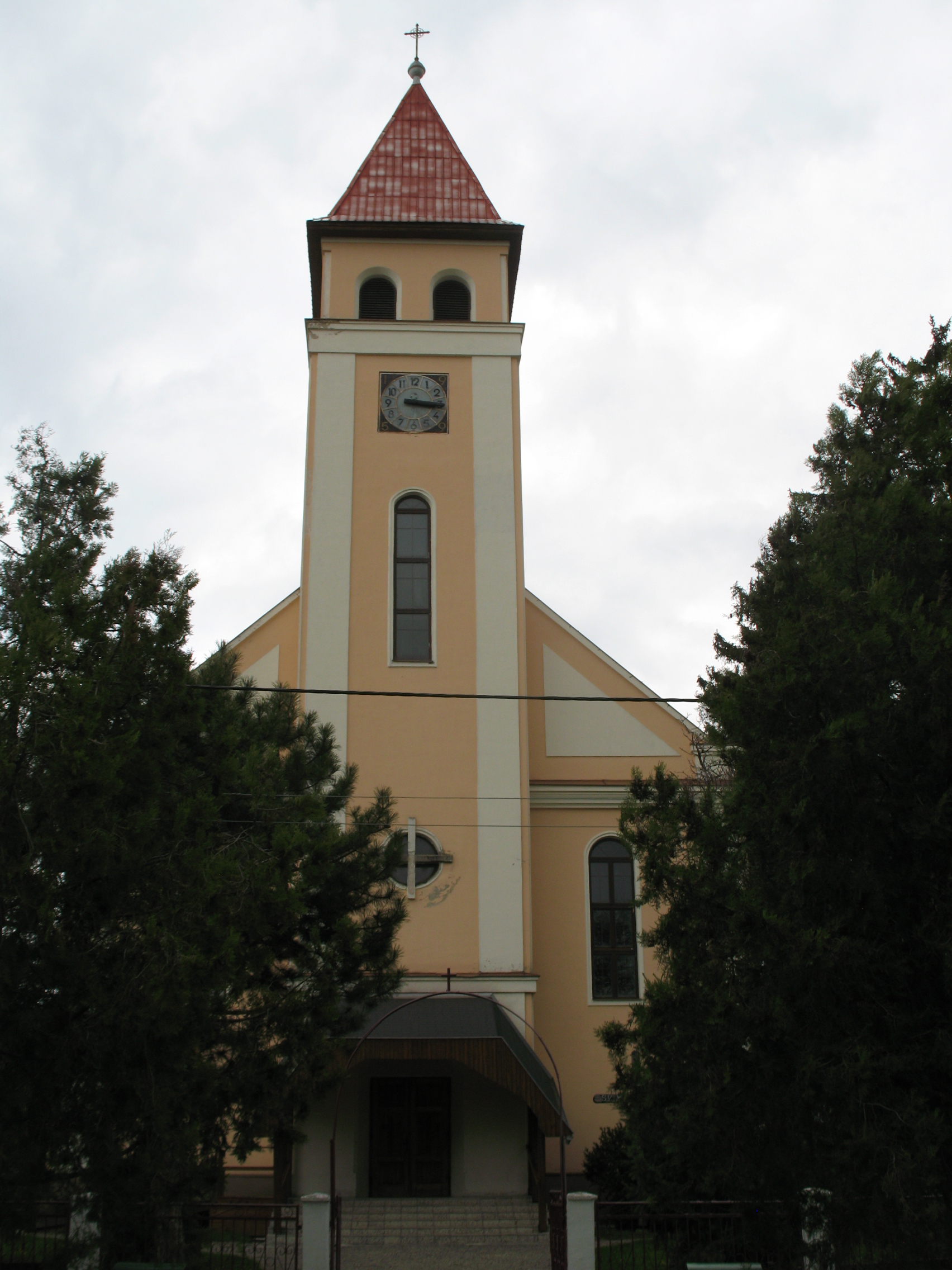 Jászfalu